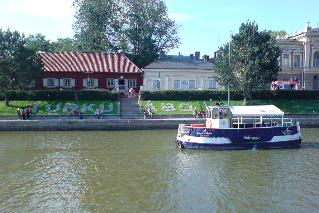 Aurajoki Turussa. Taustalla vasemmalla Apteekkimuseo, oikealla osittain kaupungintalo. Joessa kulkee pikku-föri.Aurajoki / Aura å / Aura river